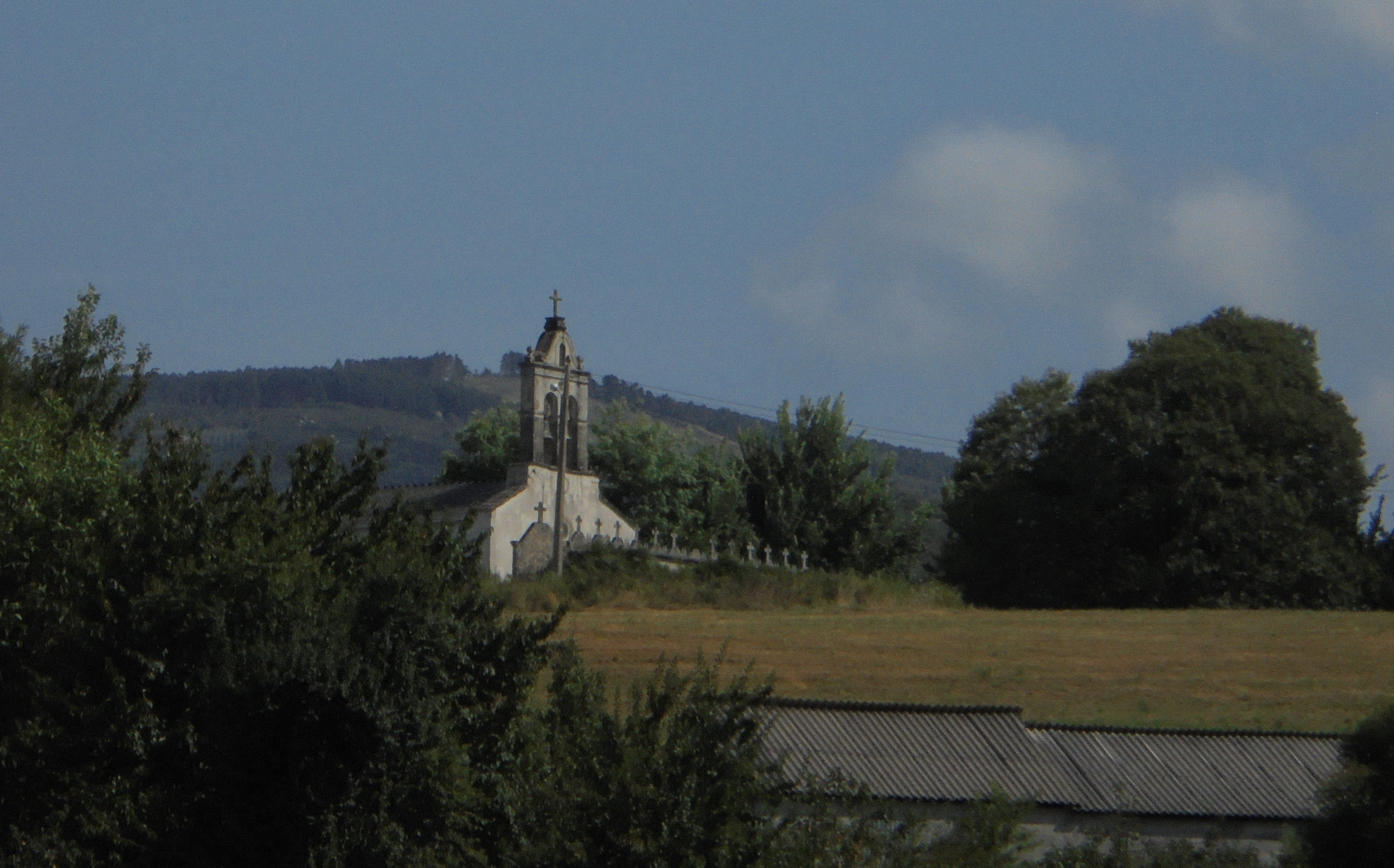 Vista de Piñeira